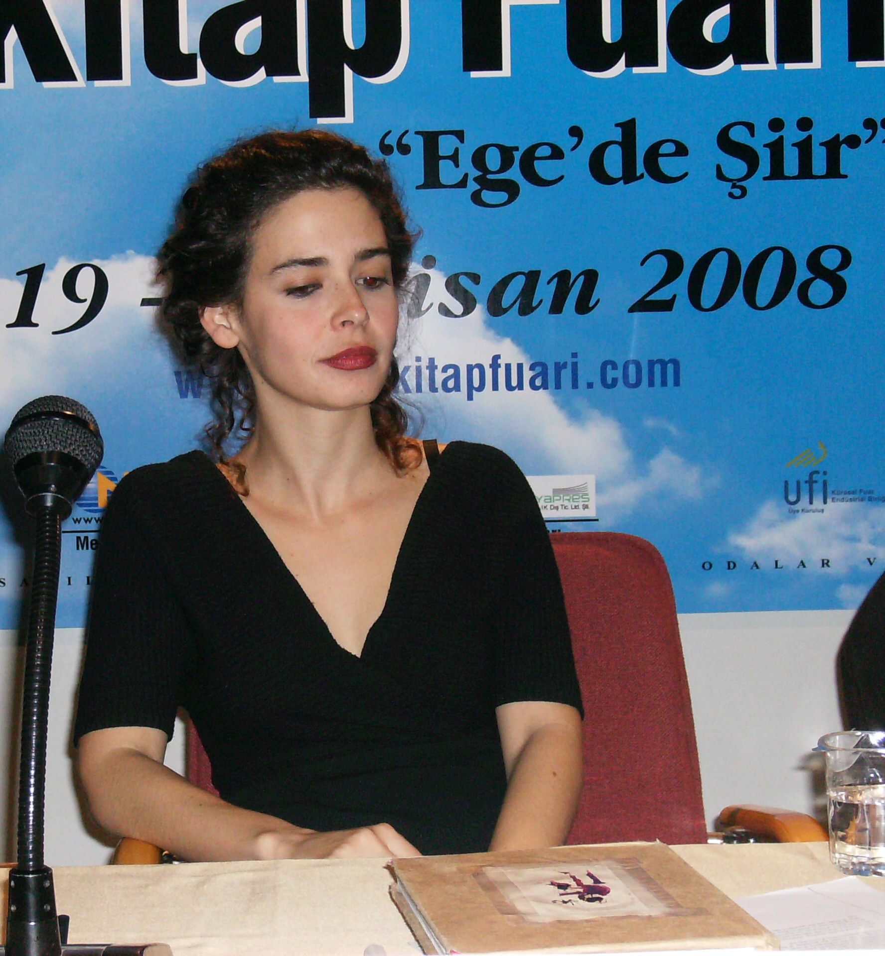 Pelin Batu: 13. İzmir Kitap Fuarı